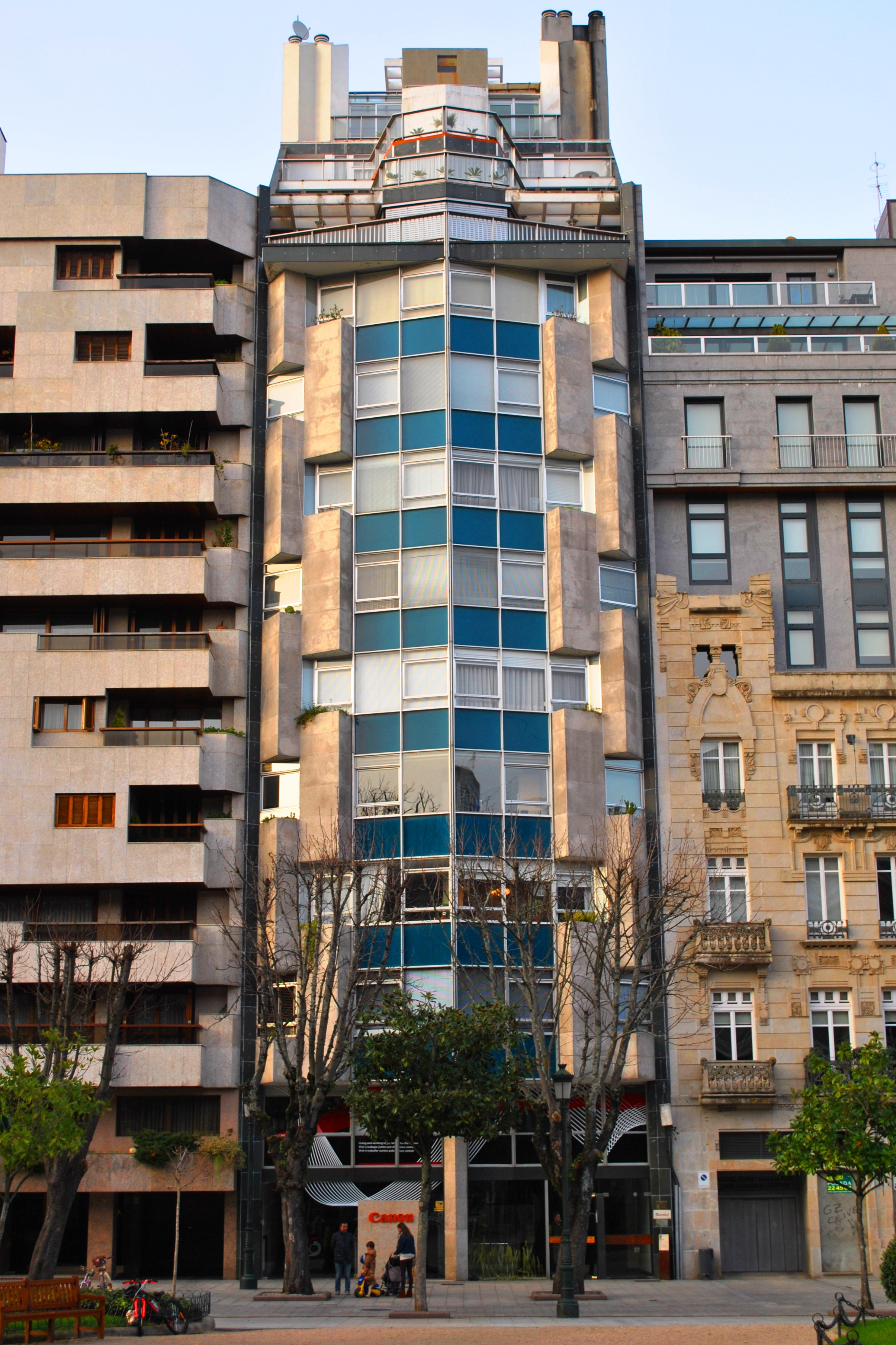 Véxase o título e as categorías